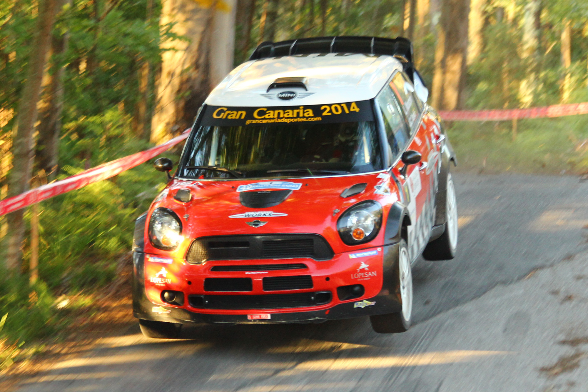 Rally Rias Baixas 2013 (Luis Monzón)